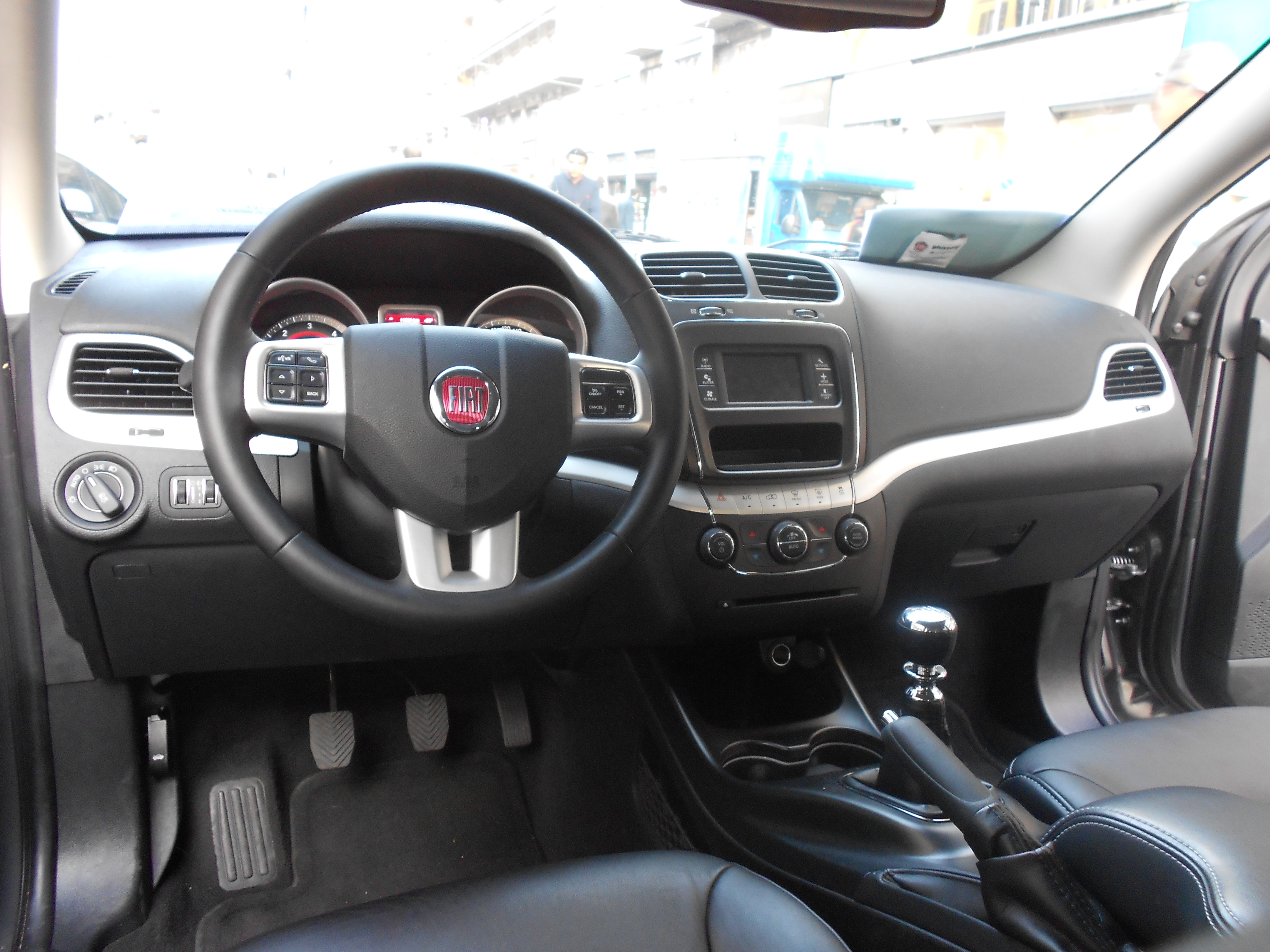 Interni del nuovo Fiat Freemont